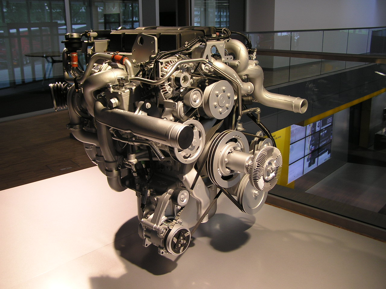 Ein MAN Vierzylinder Dieselmotor, Typ D0834LFL mit einem Hubraum von 4,580 dm³; Common Rail Einspritzung; 2-stufige Aufladung; 162 kW (220 PS); max. Drehmoment 850 Nm bei 1.400 1/min.; EEV durch AGR mit MAN PM-KAT.